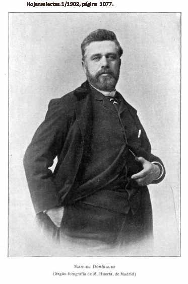 Manuel Dominguez fotografia por M.Huerta de Madrid